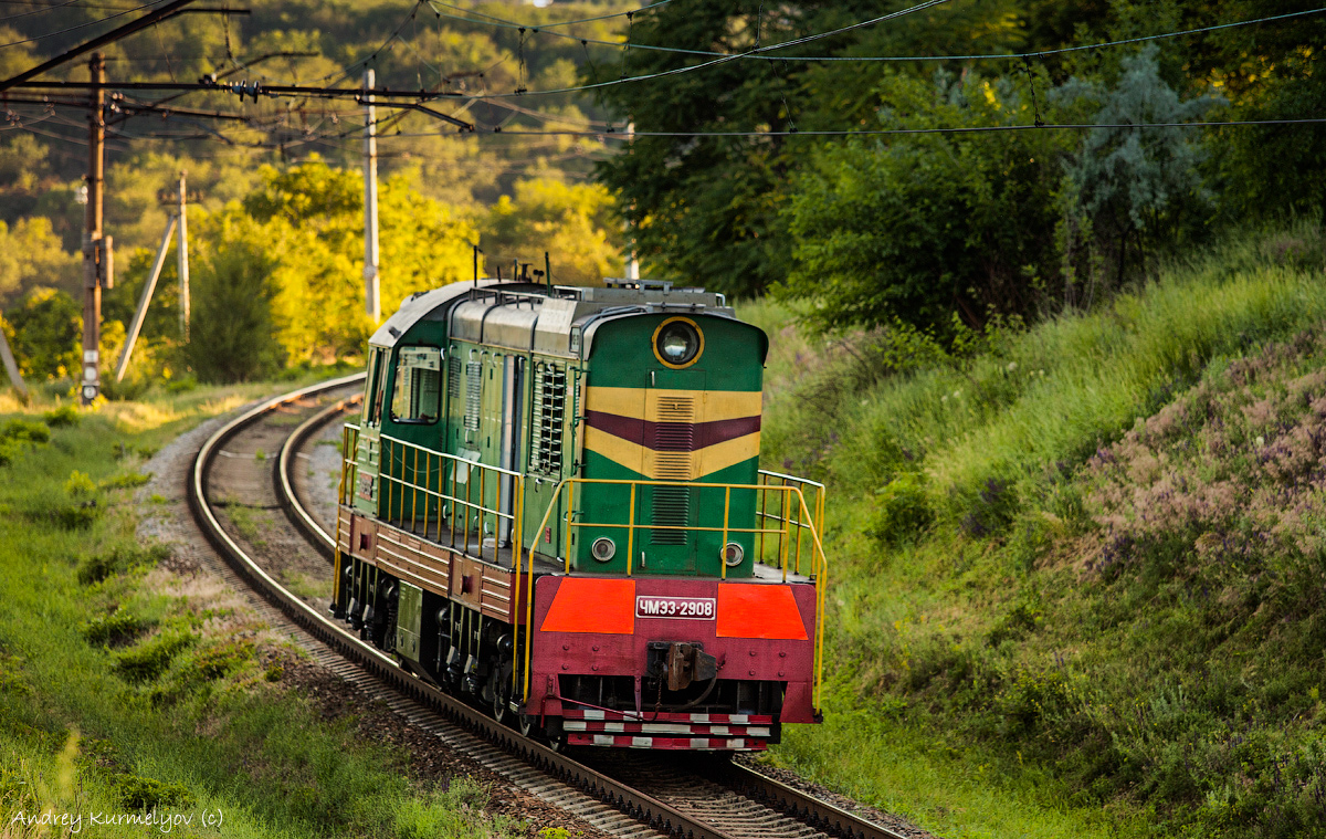 В 2013 г. передан в депо Днепропетровск